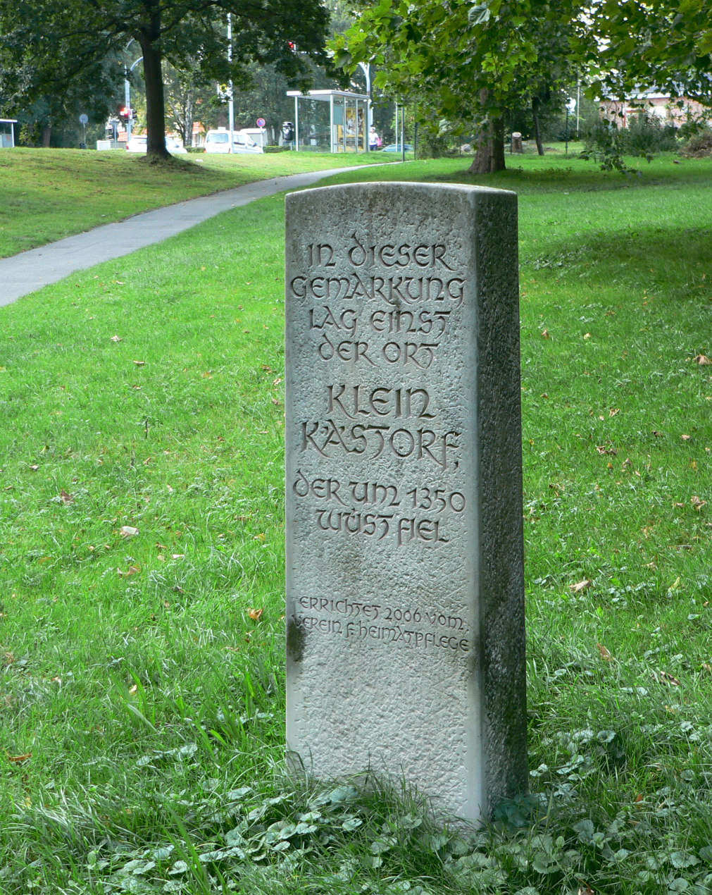 Gedenkstein für die Siedlung Klein Kästorf, ab 1350 Wüstung, heute am Neuen Teich in der Tiergartenbreite